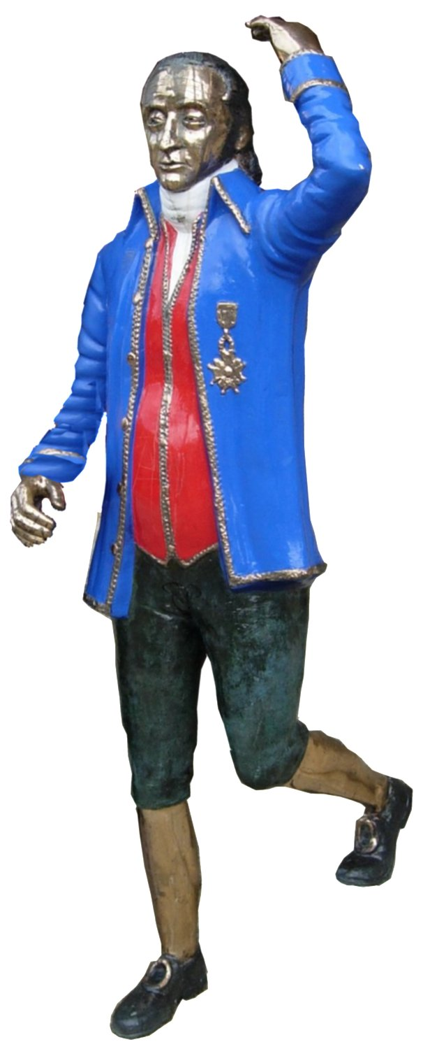 A estatua en bronce policromado do Marqués de Sargadelos (Ribadeo)